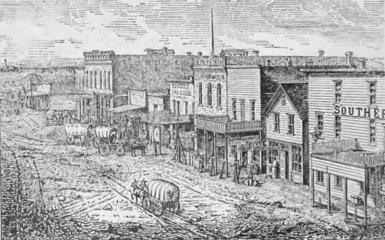 Advertisement, Kansas, USA